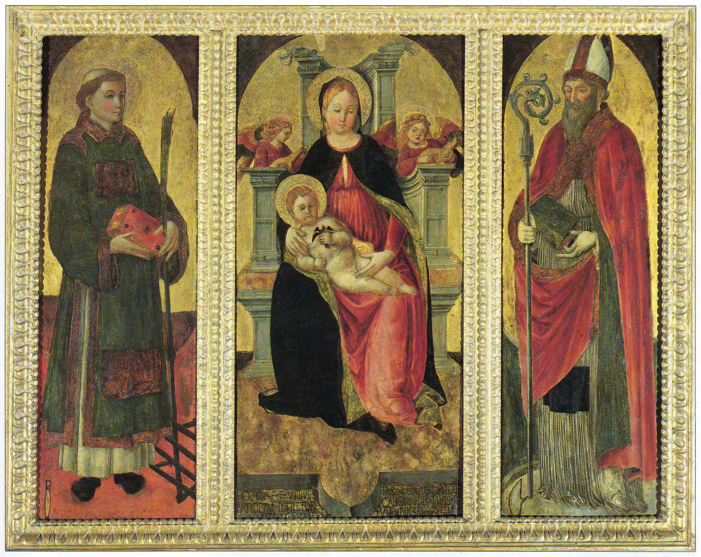 madonna col bambino tra i santi lorenzo e agostino, paolo da caylina il vecchio, brescia